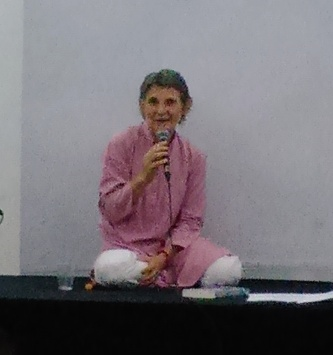 E. Inandiak, dalam suatu acara peluncuran buku di Balai Sudjatmoko, Sala. (2015).